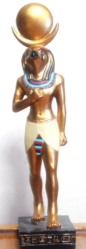 ra heykelciğim :)